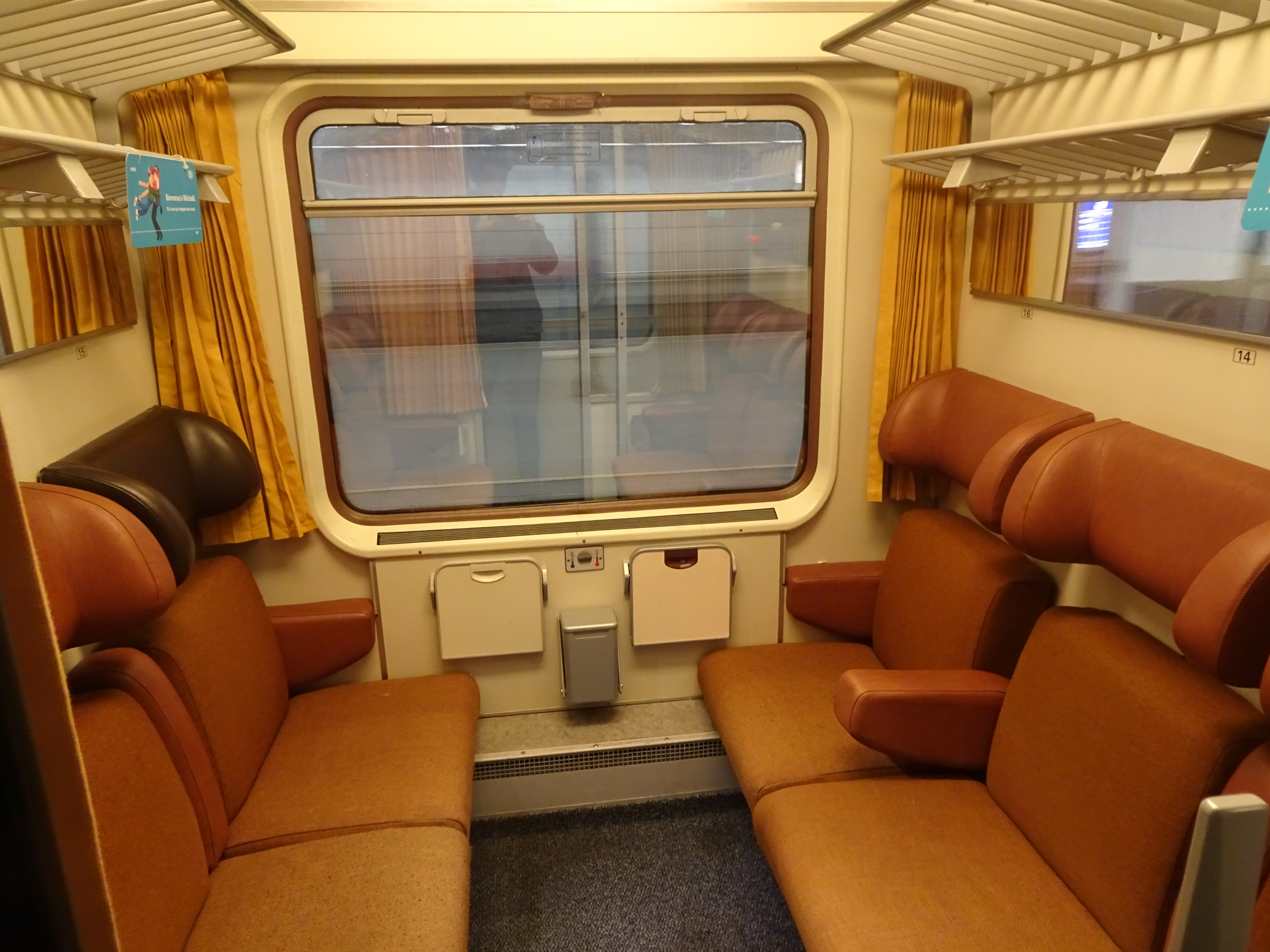 Intérieur d’une voiture I6 de seconde classe non-rénovée. La plupart des I6 en service ont reçu, entre 2017 et 2019 une rénovation partielle (nouveaux intérieurs, livrée inchangée) ou une rénovation intégrale (nouveaux intérieurs et nouvelle livrée). celle-ci n'a pas encore été rénovée et comporte encore des aménagements quasi-identiques à ceux qu'elle avait lors de sa mise en service en 1977. Si les couleurs sont plus chaleureuses que les voitures rénovées, cette voiture a subi le poids des années : rideaux et appuie-tête dépareillés, mécanisme des sièges grippé, tablettes coincées et portes de compartiments qui s'ouvrent à chaque freinage...